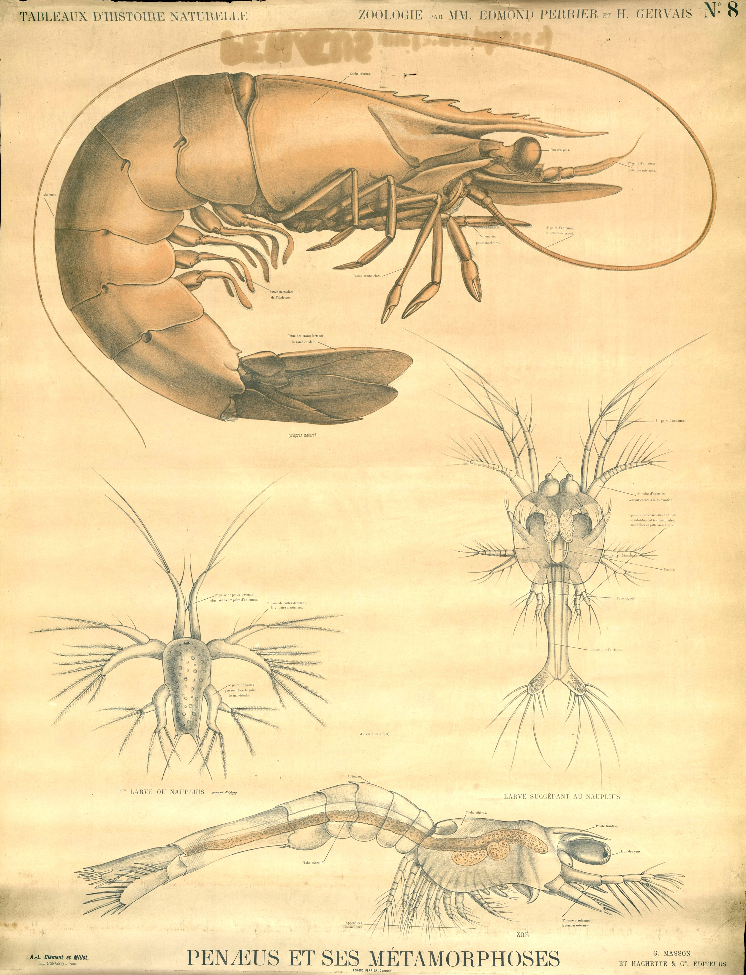 Penaeus et ses métamorphoses. Bibliothèque Numérique de l'Université d'Artois. Retrieved on 27 March 2016.